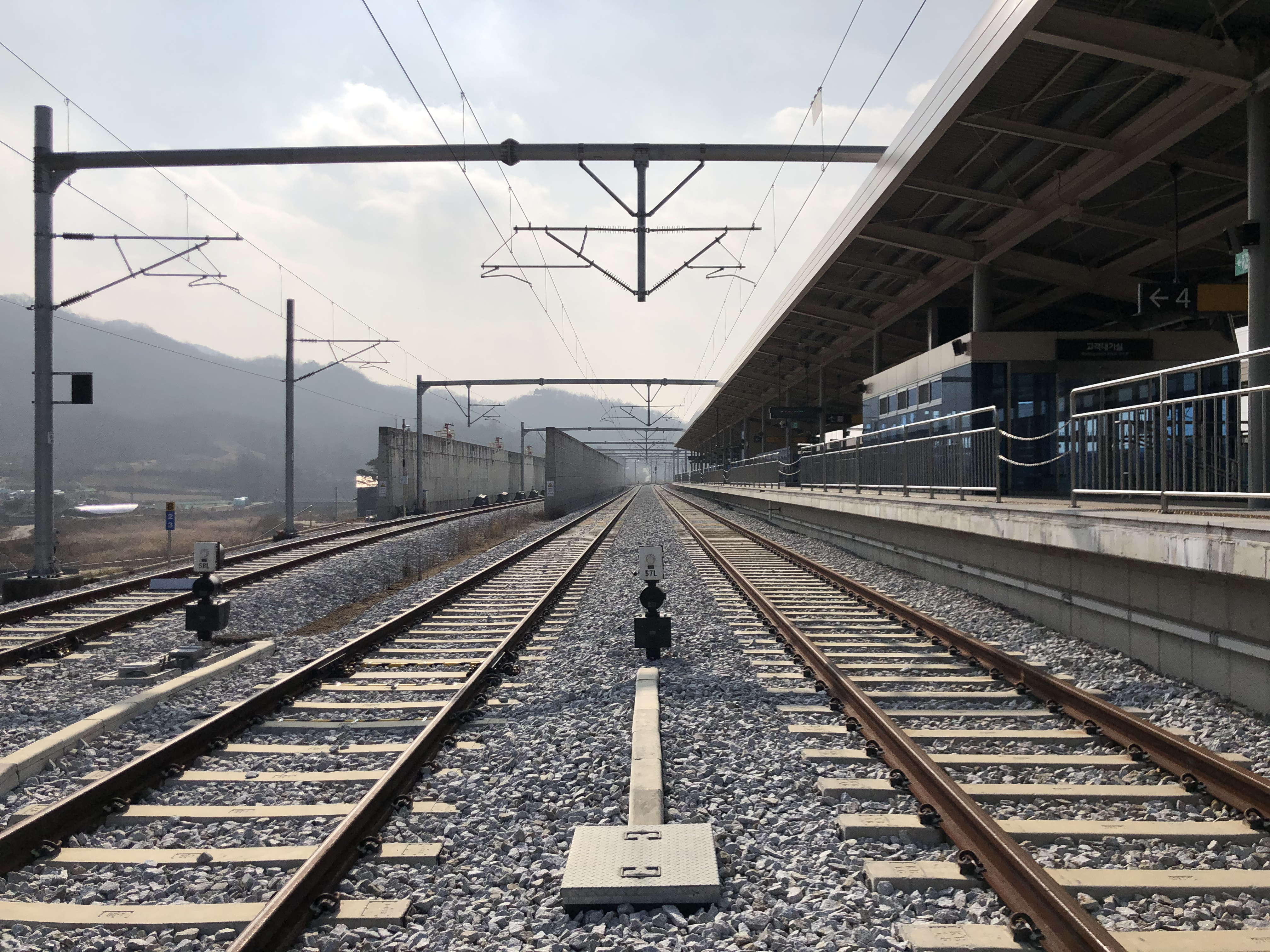 2020년 횡성소방서 재난대비 긴급구조종합훈련 대상처 선정을 위한 사전협의